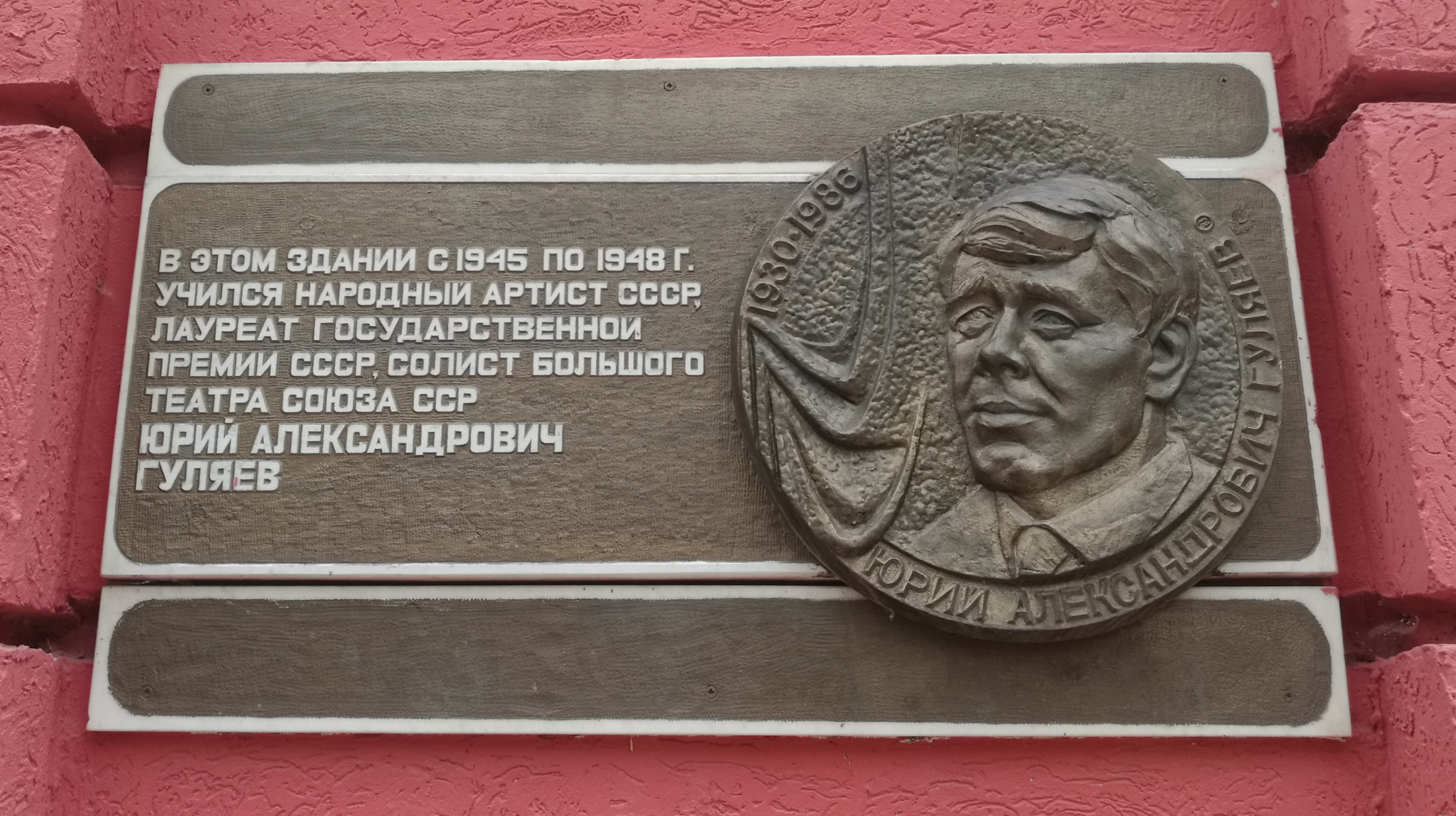 Memortabulo pri Jurij Gulajev sur lernejo N 25. Tjumeno, Rusio.